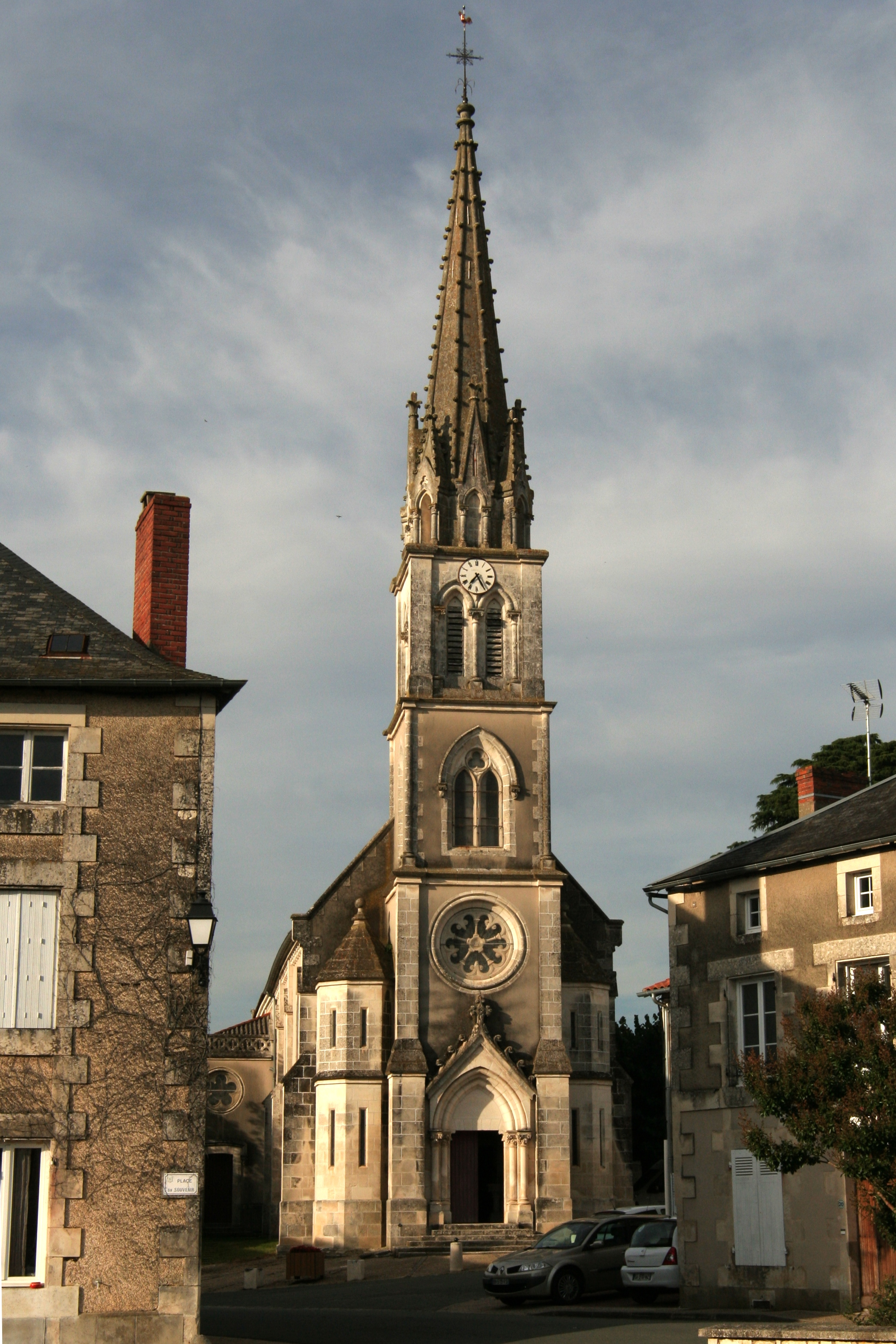 Église Saint-Jean-Baptiste de Lhommaizé.